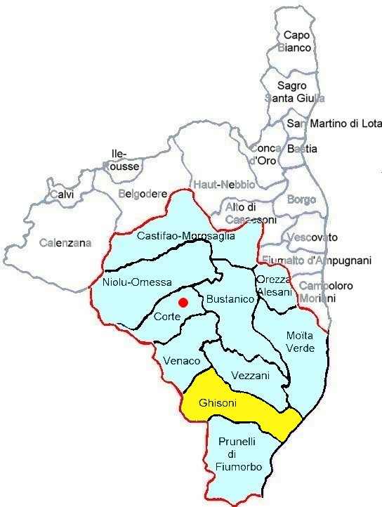 Localisation du canton de Ghisoni, Castellu, Haute-Corse